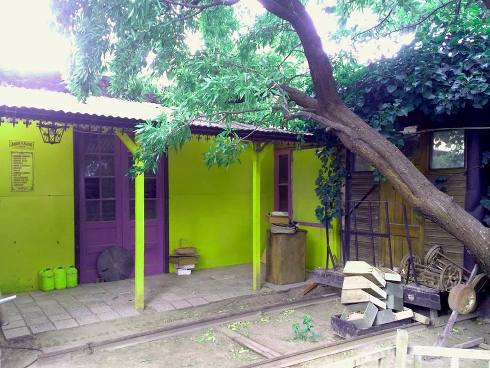 Recreaciòn artistica de la estaciòn en el western Cañadon Lagarto en Comodoro